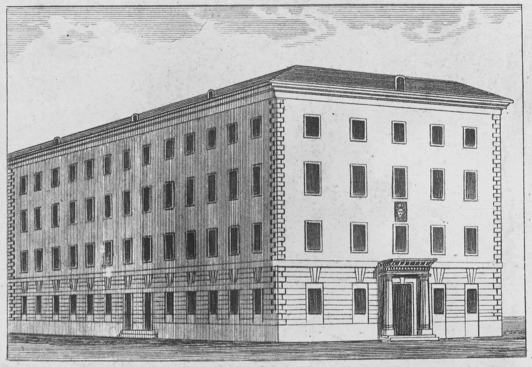 Schönfeldtska huset då Vetenskapsakademin fanns i huset, stålstick